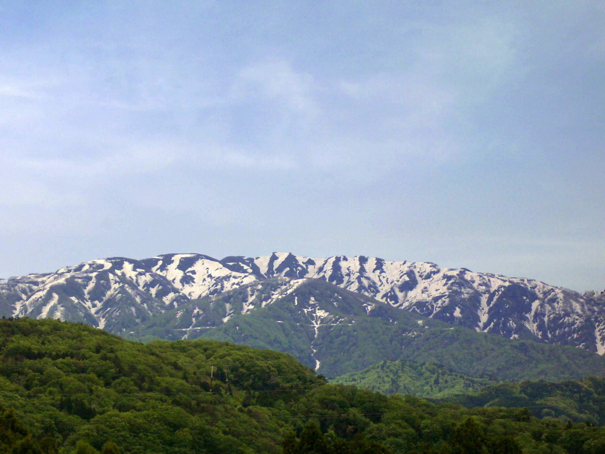 5月連休頃の僧ヶ岳の雪絵